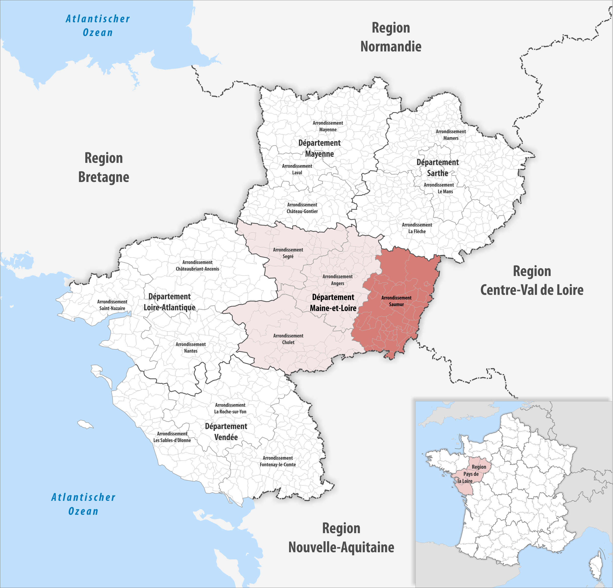 Lage des Arrondissements Saumur